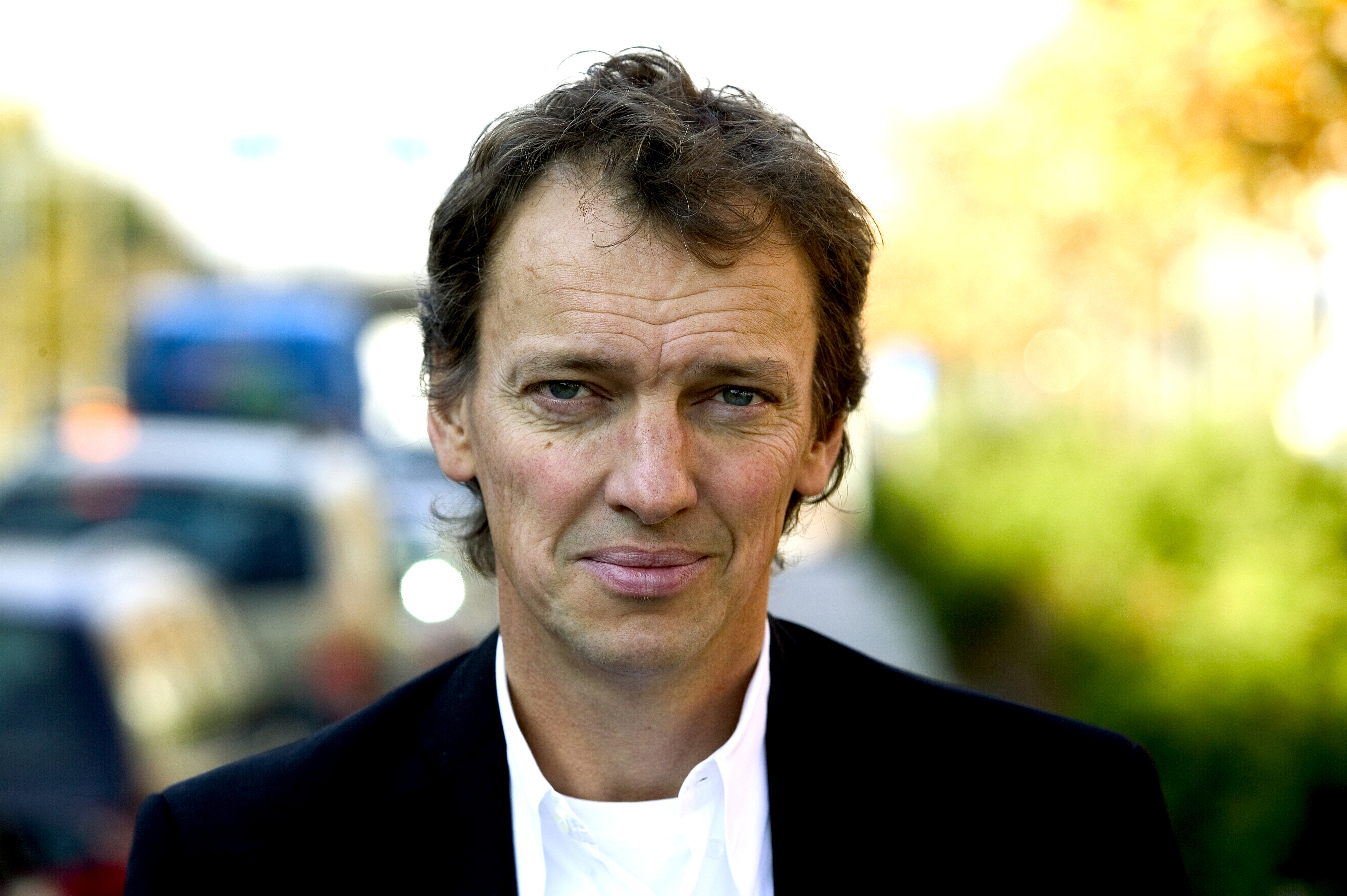 Lennart Ekdal är en av TV4:s mest profilerade journalister. Tidigare i år fick Lennart Aktiespararnas stipendium för god ekonomijournalistik med för att han "under flera år utvecklat en intervjukonst som samtidigt bär stringensens och elegansens prägel" samt "lyckats presentera komplicerade fakta på ett för den breda allmänheten begripligt sätt.